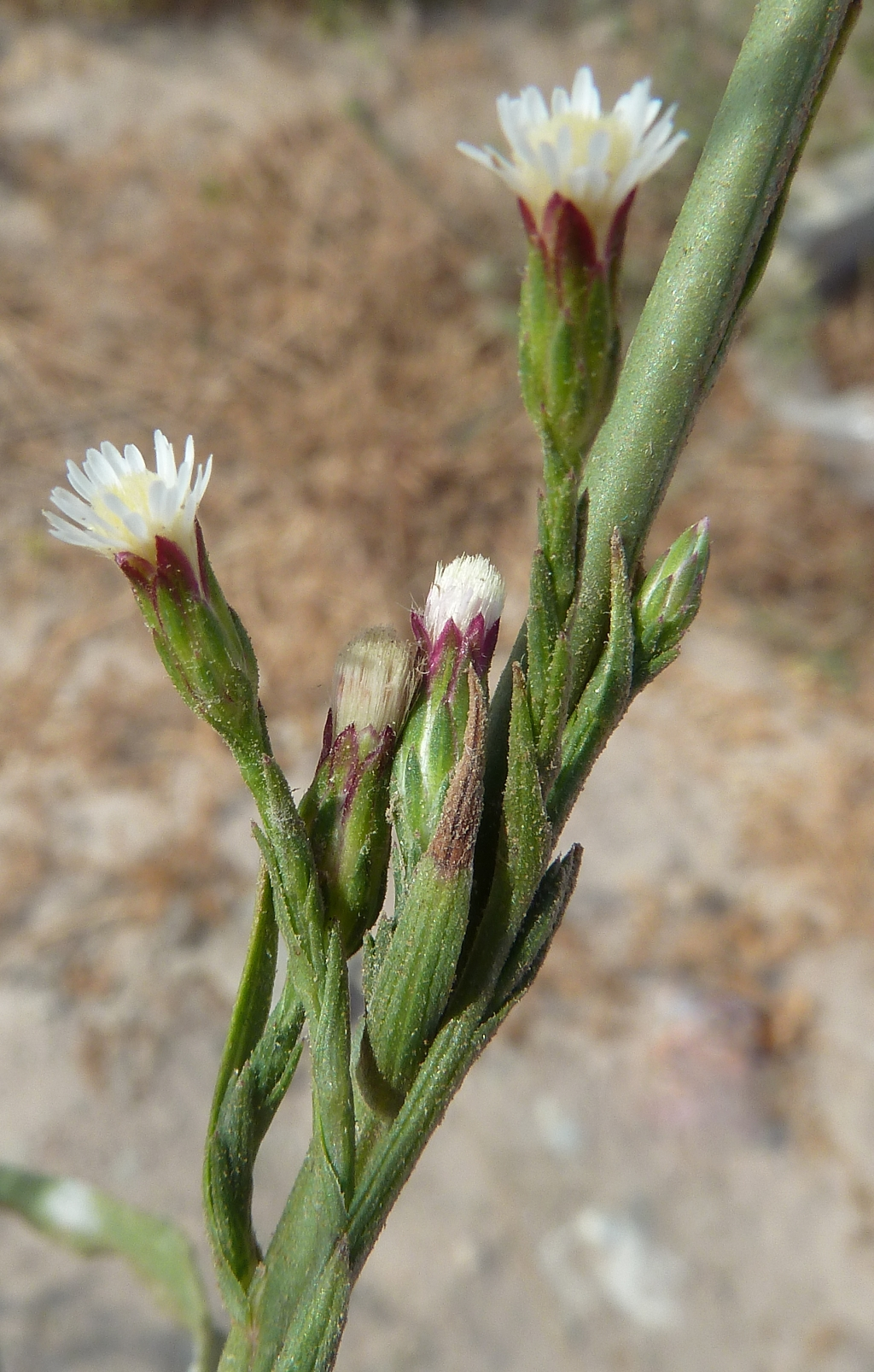 Symphyotrichum squamatum ( = Aster squamatus) - Matacavero, Pirulero - calle del Papa Juan Pablo III, circa Estación FFCC, Águilas (Murcia, España).